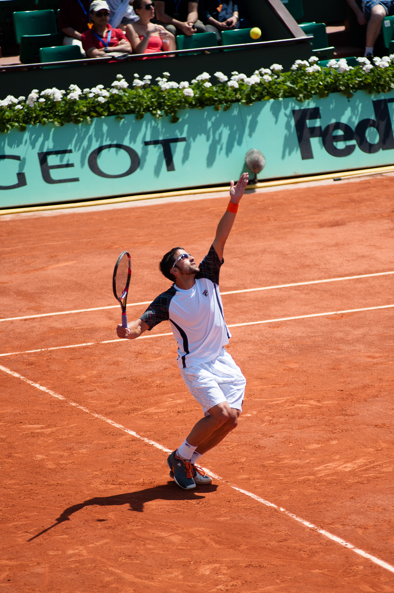 Janko Tipsarević, Roland-Garros 2012.